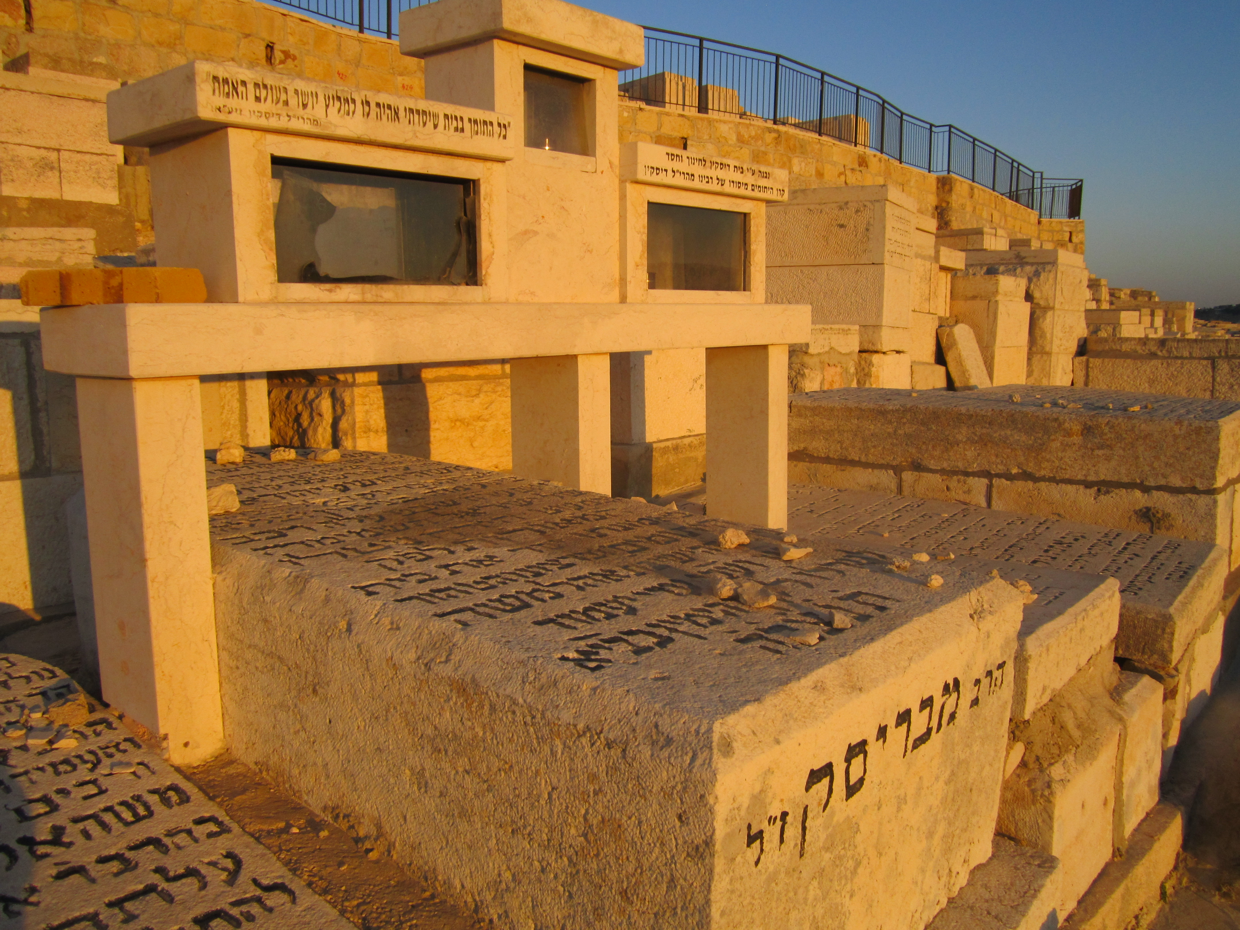 קבר המהרי"ל דיסקין בהר הזיתים